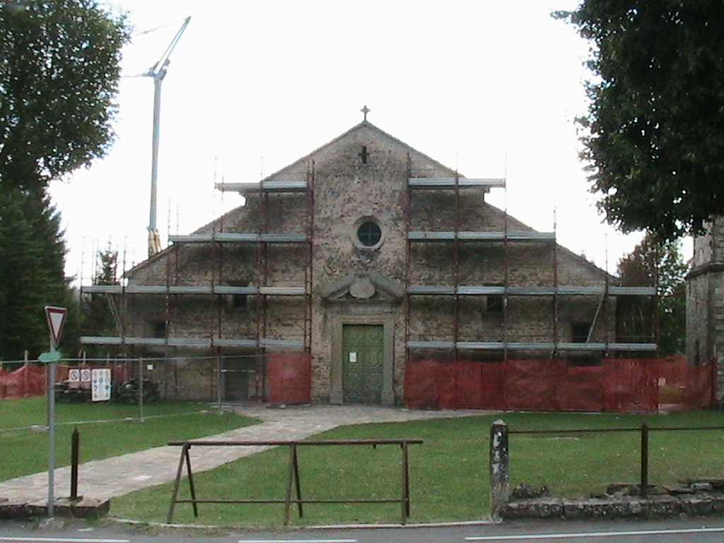 Scurano (Neviano degli Arduini) - La Pieve in restauro